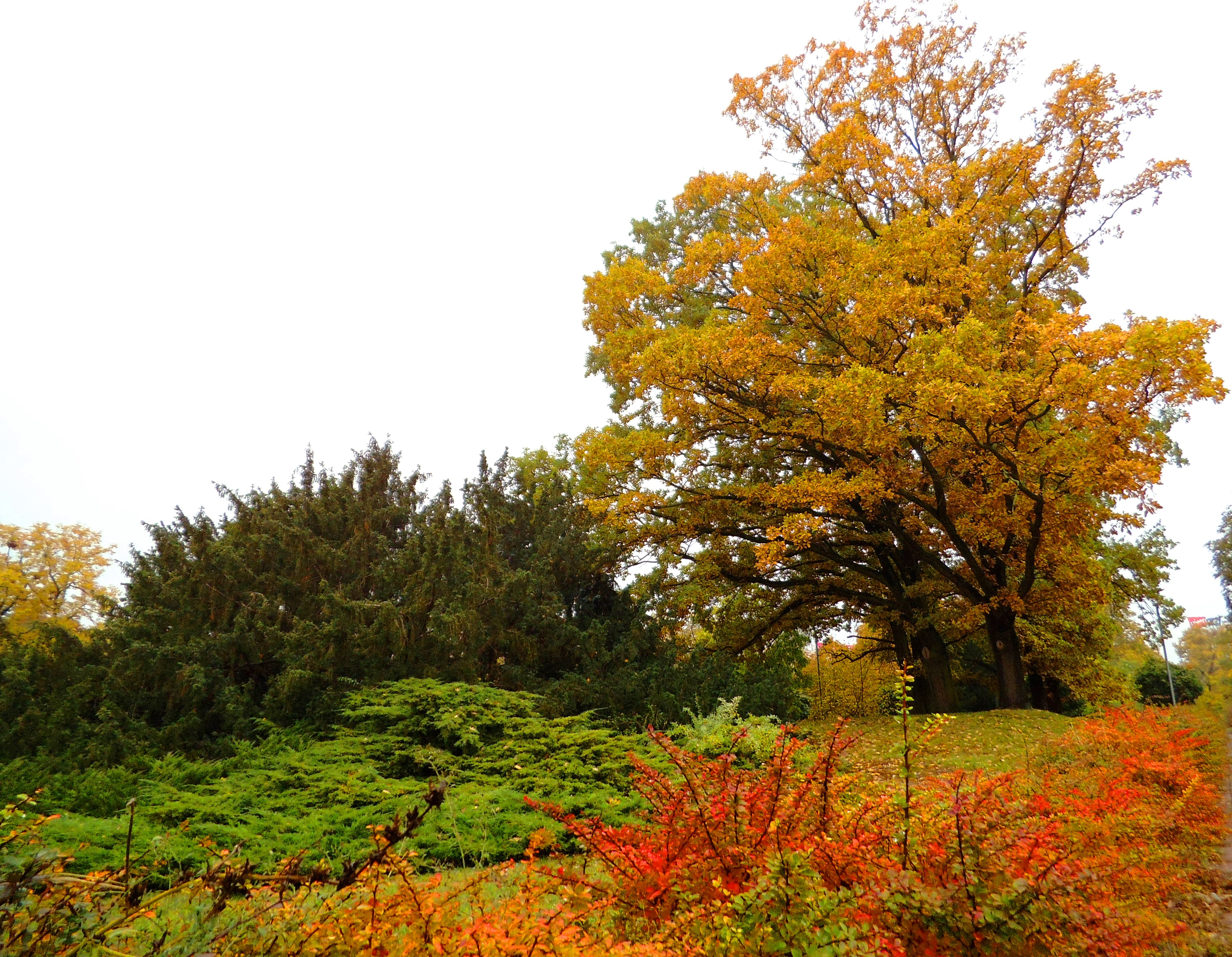 Część zielona „Jordanek” w Toruniu4